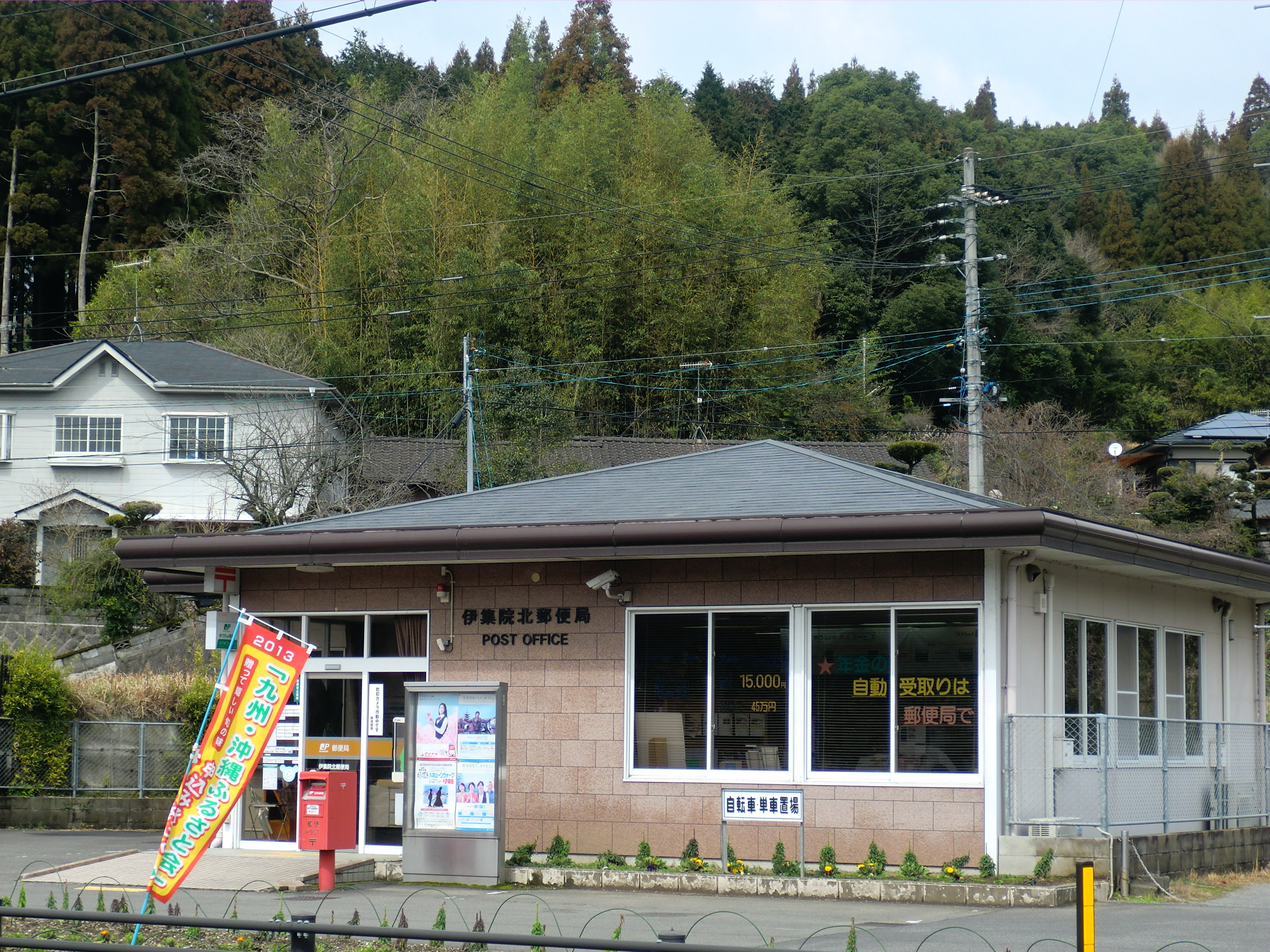 日置市にある伊集院北（いじゅういんきた）郵便局